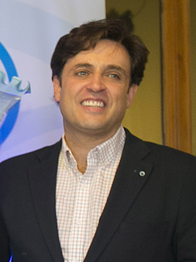 Copa de Navidad de Galapagar